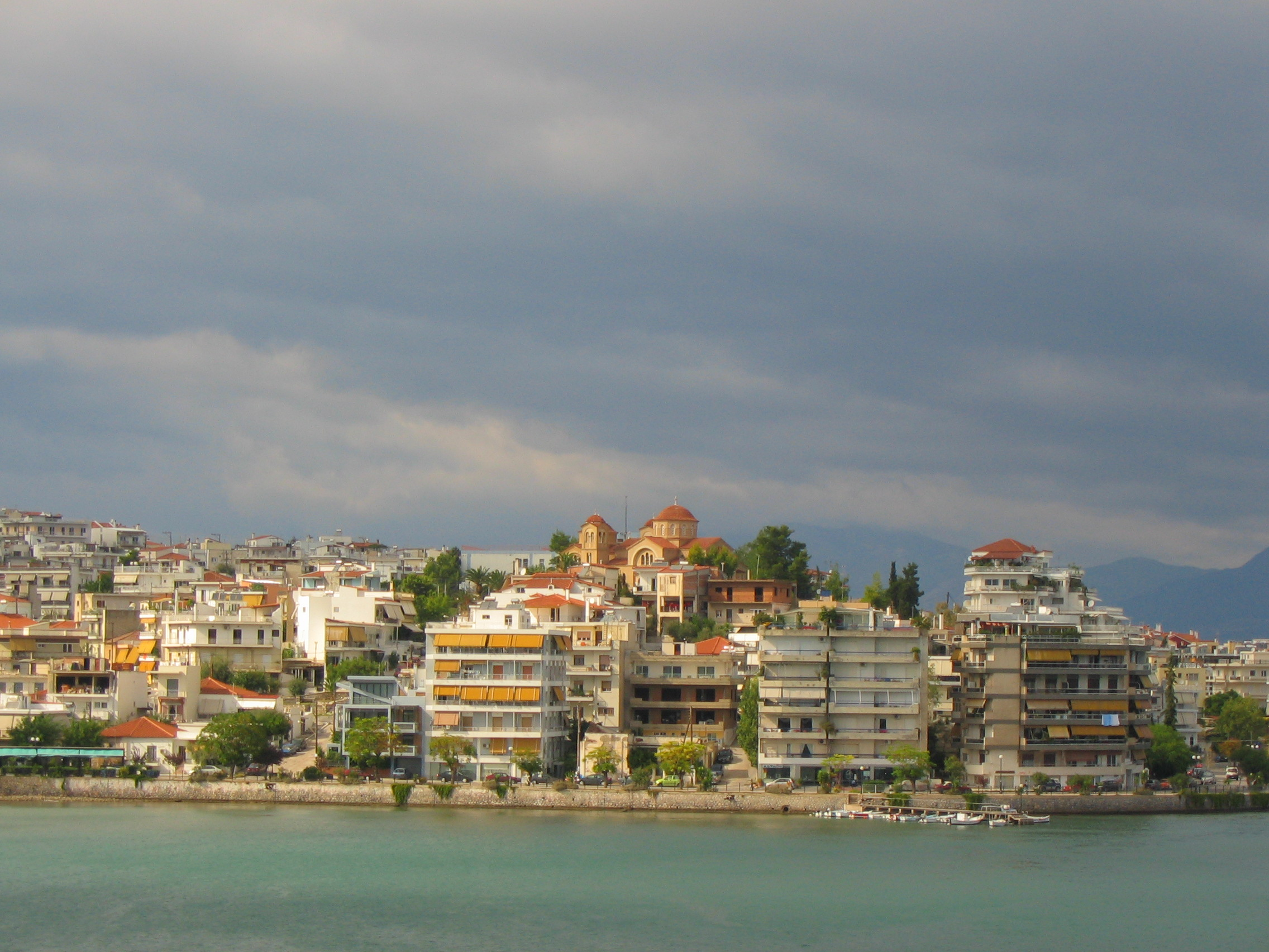 Набережная города Халкиды, Греция, материковая часть